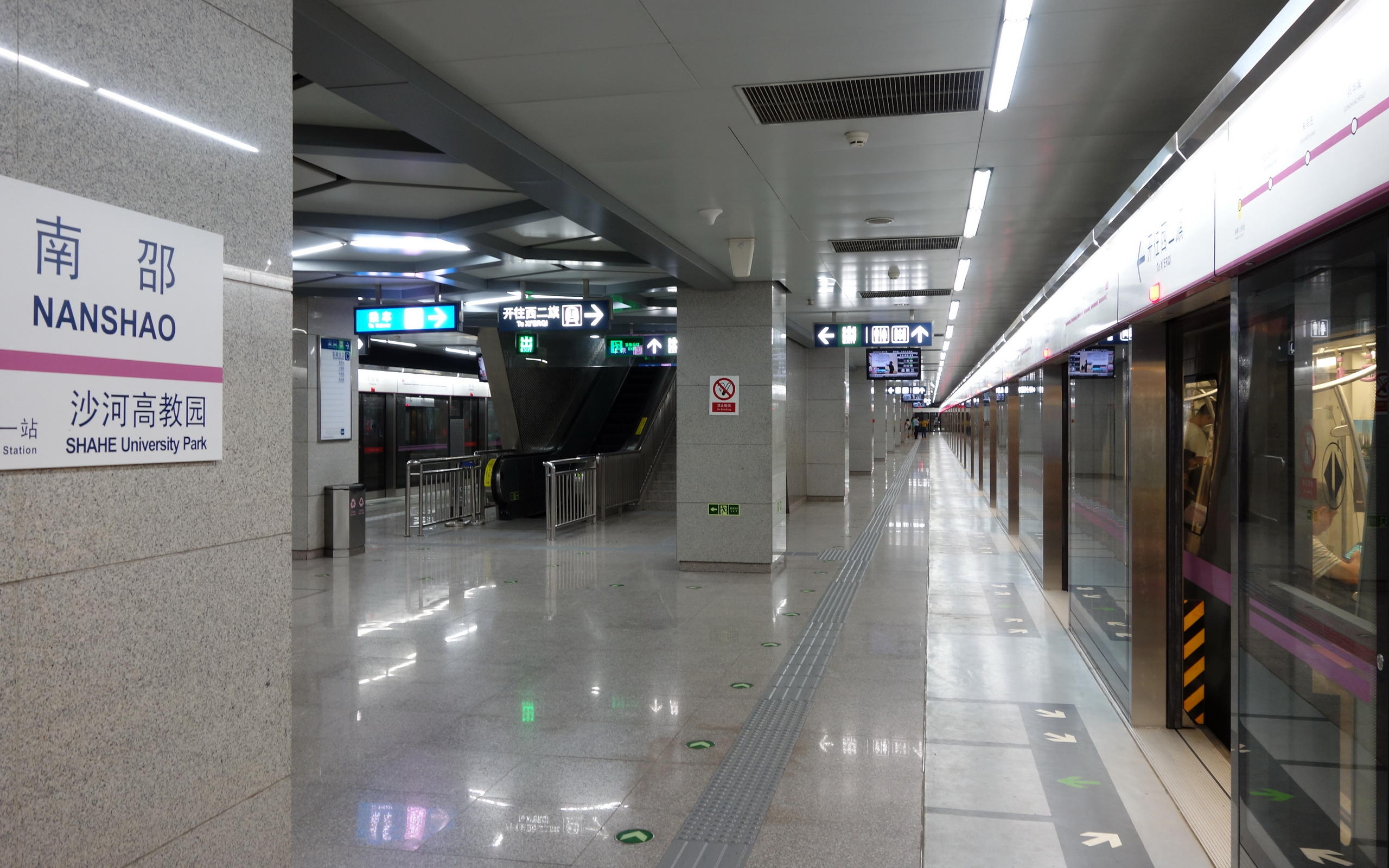 北京地铁昌平线南邵车站的岛式站台。